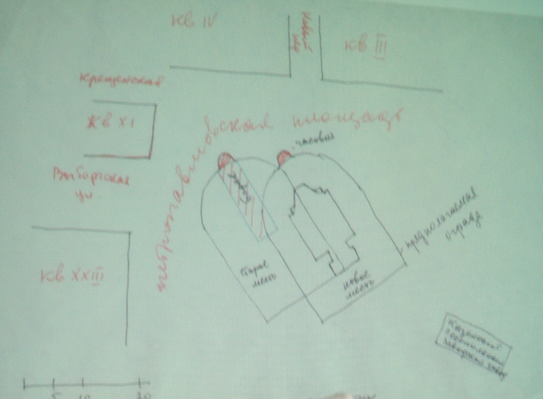 Сестрорецк СПб. Эскиз расположения Петропавловской церкви